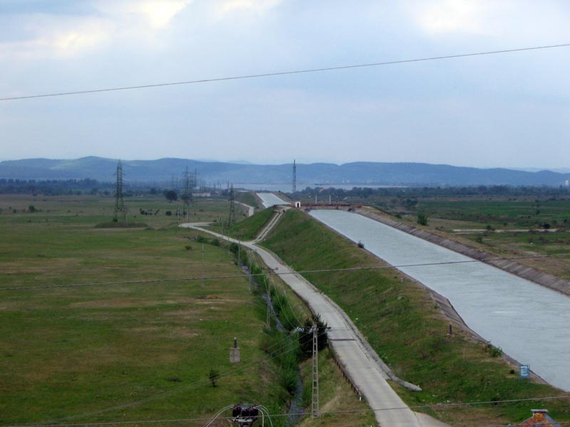 „Autostrada apelor” din Țara Hațegului. Porțiune din amenajarea hidroenergetică Râu Mare-Retezat, județul Hunedoara